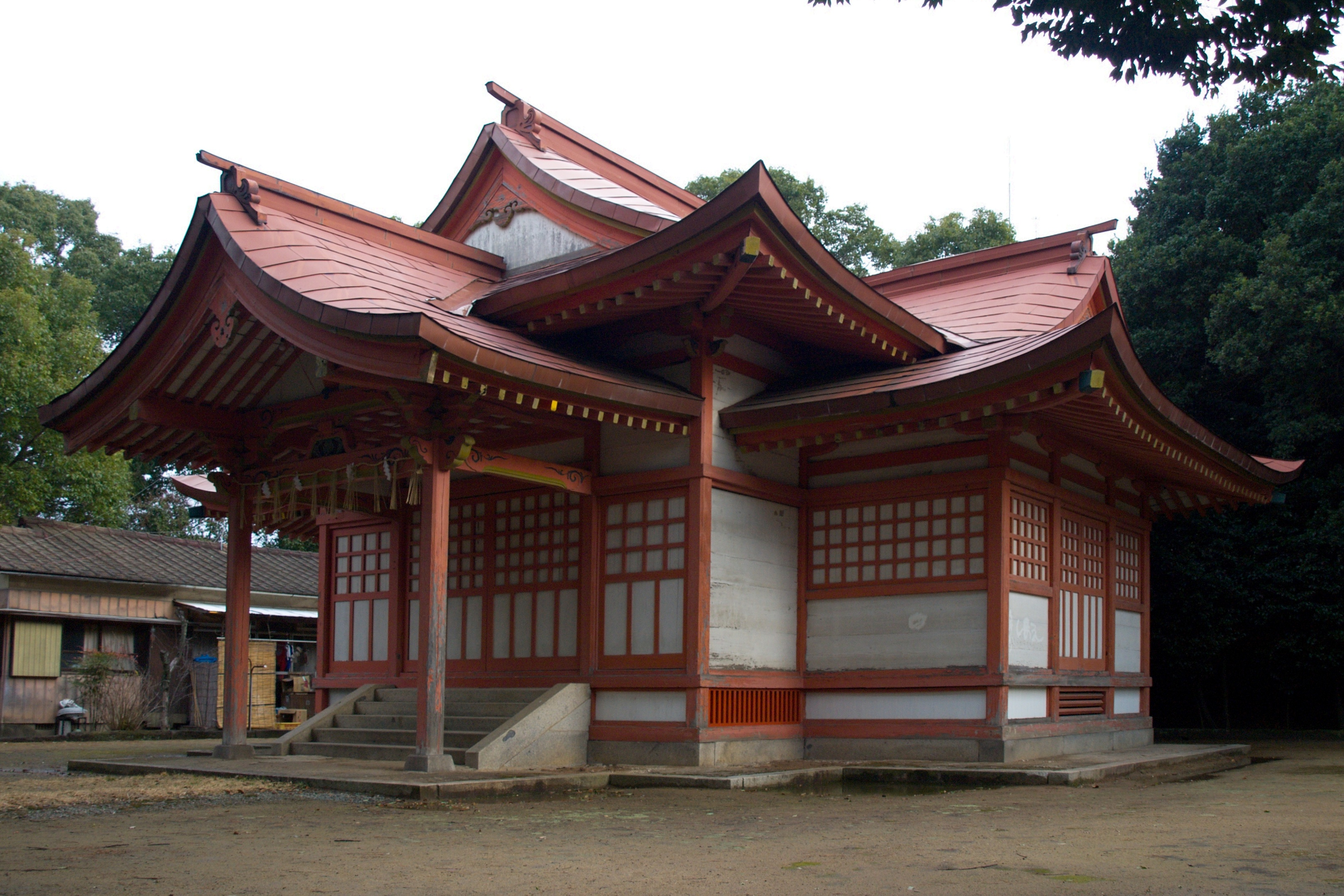 福岡県福岡市東区 香椎宮頓宮